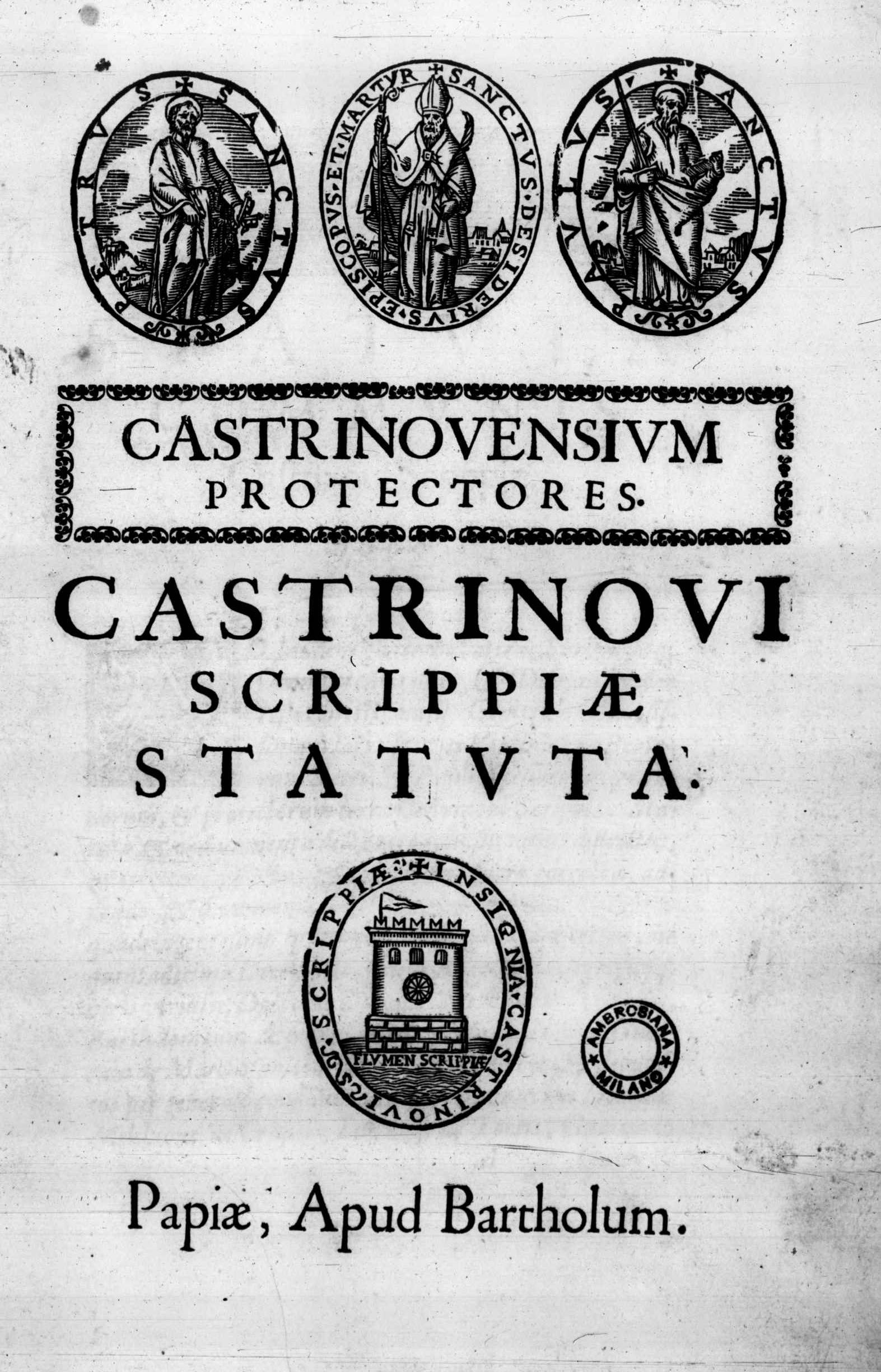 Frontespizio